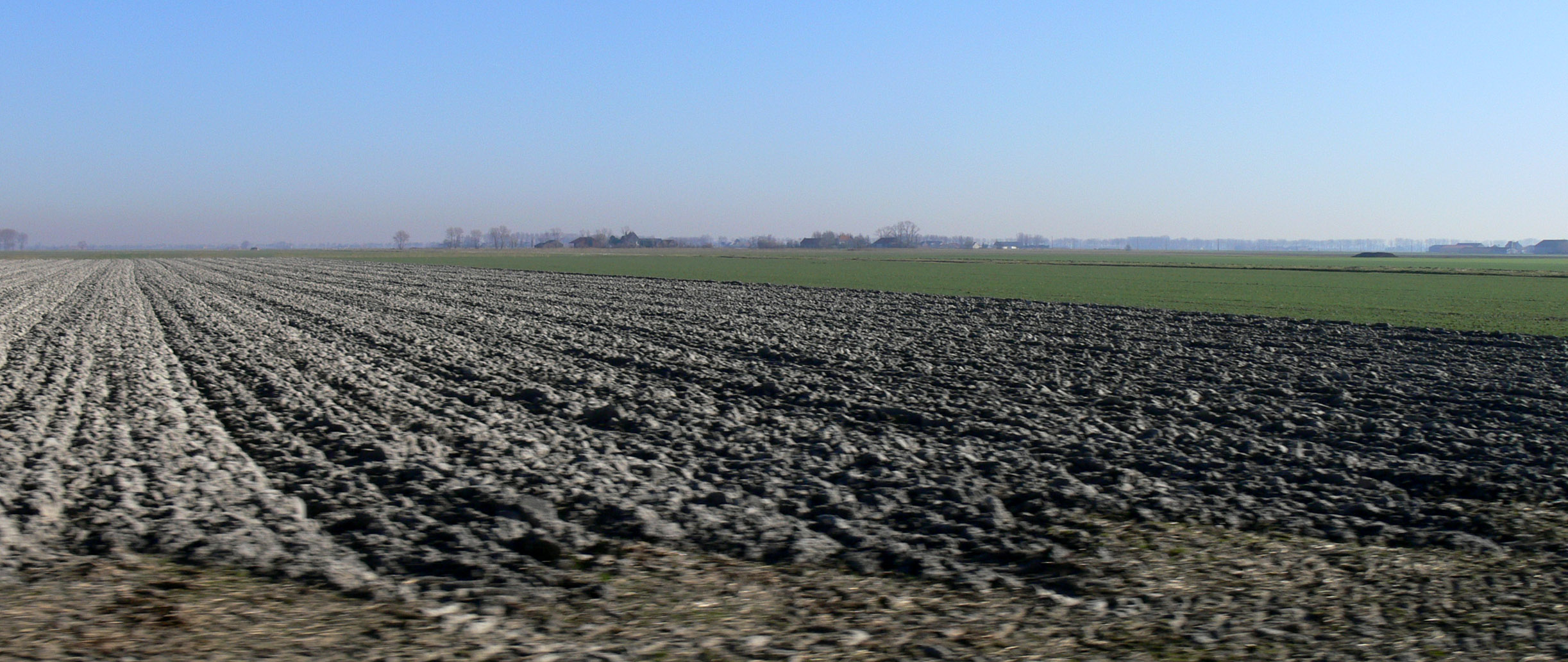 paysage poldérien des moëres, Flandres maritimes, côté français. Cette zone est aujourd'hui située à environ 2 m sous le niveau moyen de la mer. Jour de pic de pollution (noter l'horizon brunâtre).